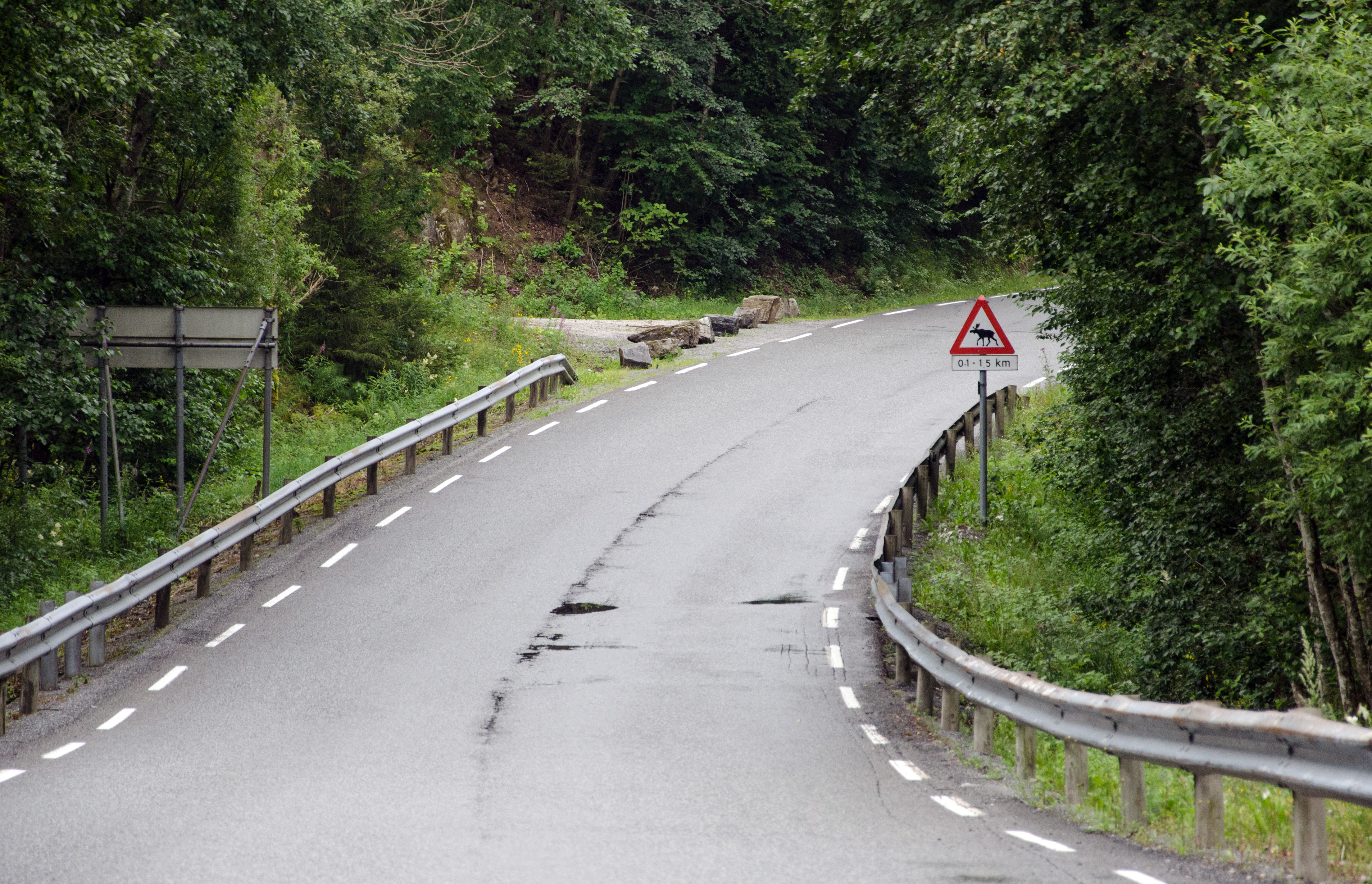 Telemarks fylkesvei 363